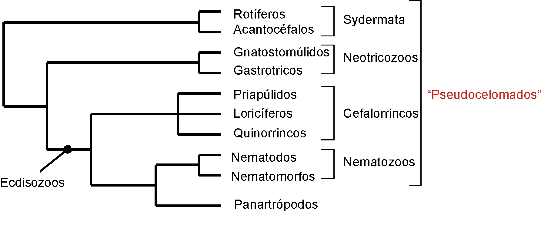 Cladograma de los Pseudocelomados